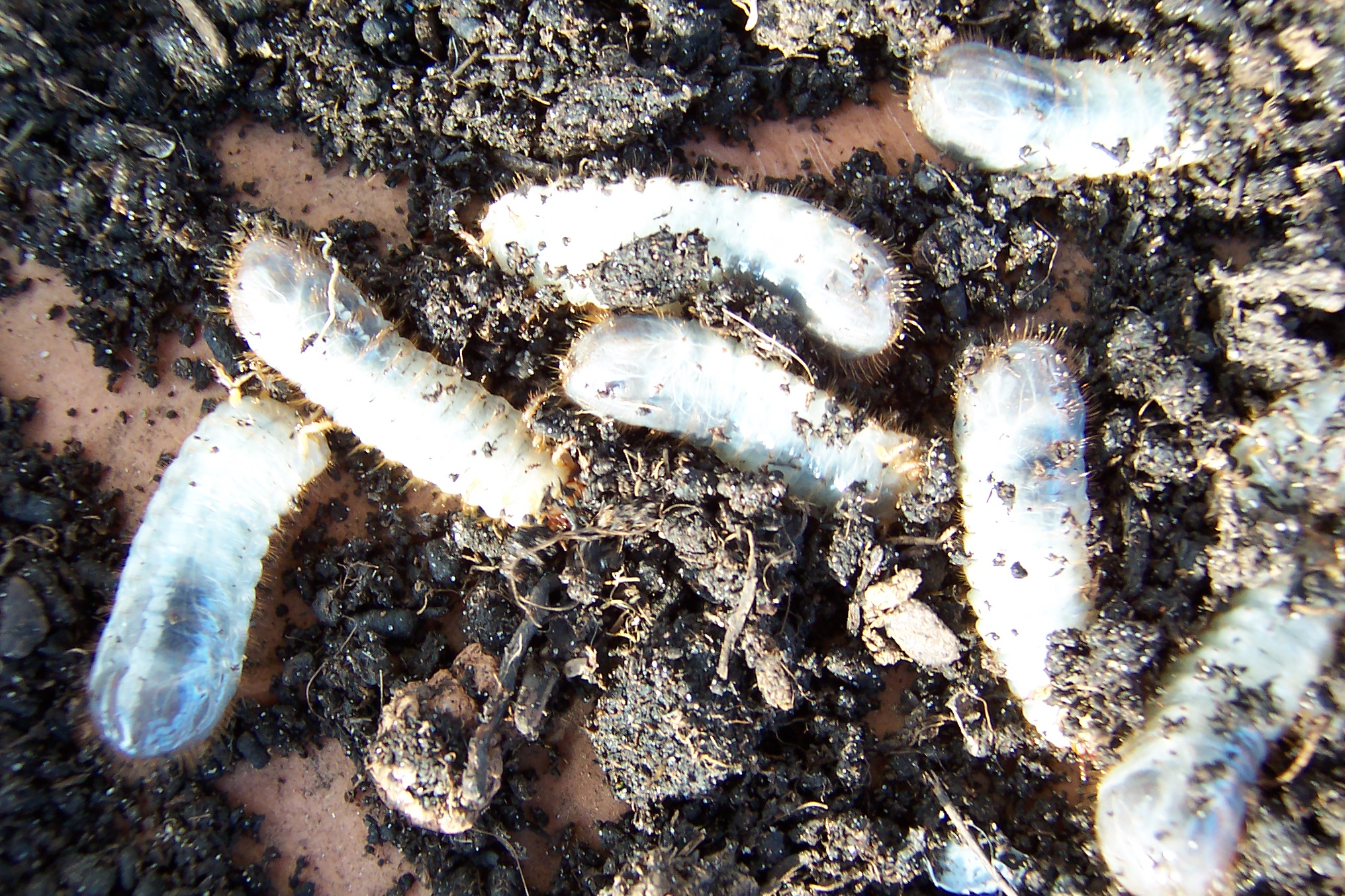 Engerlinge des Junikäfers N/A